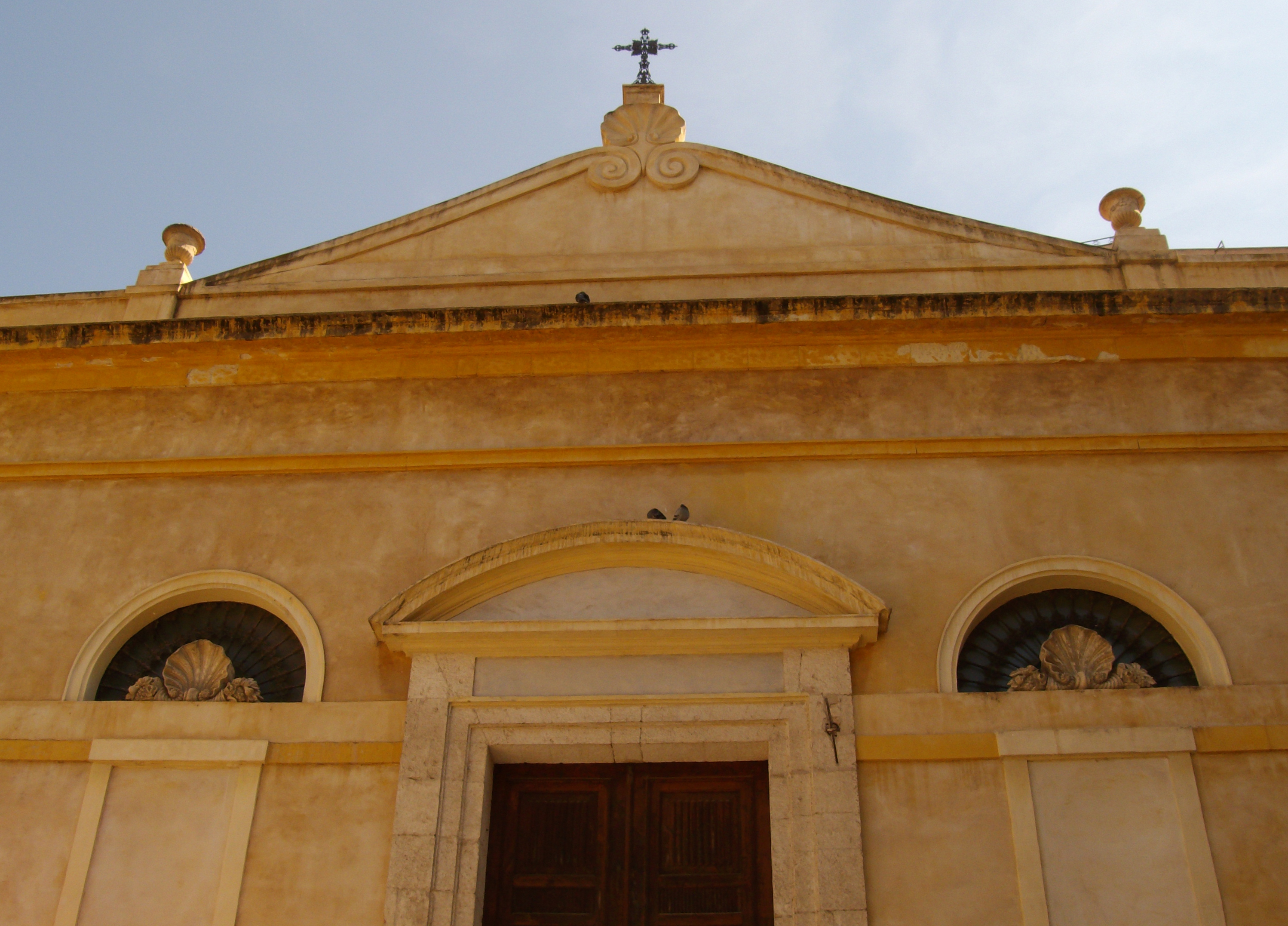 Chiesa di San Sepolcro (XVII secolo) - Cagliari